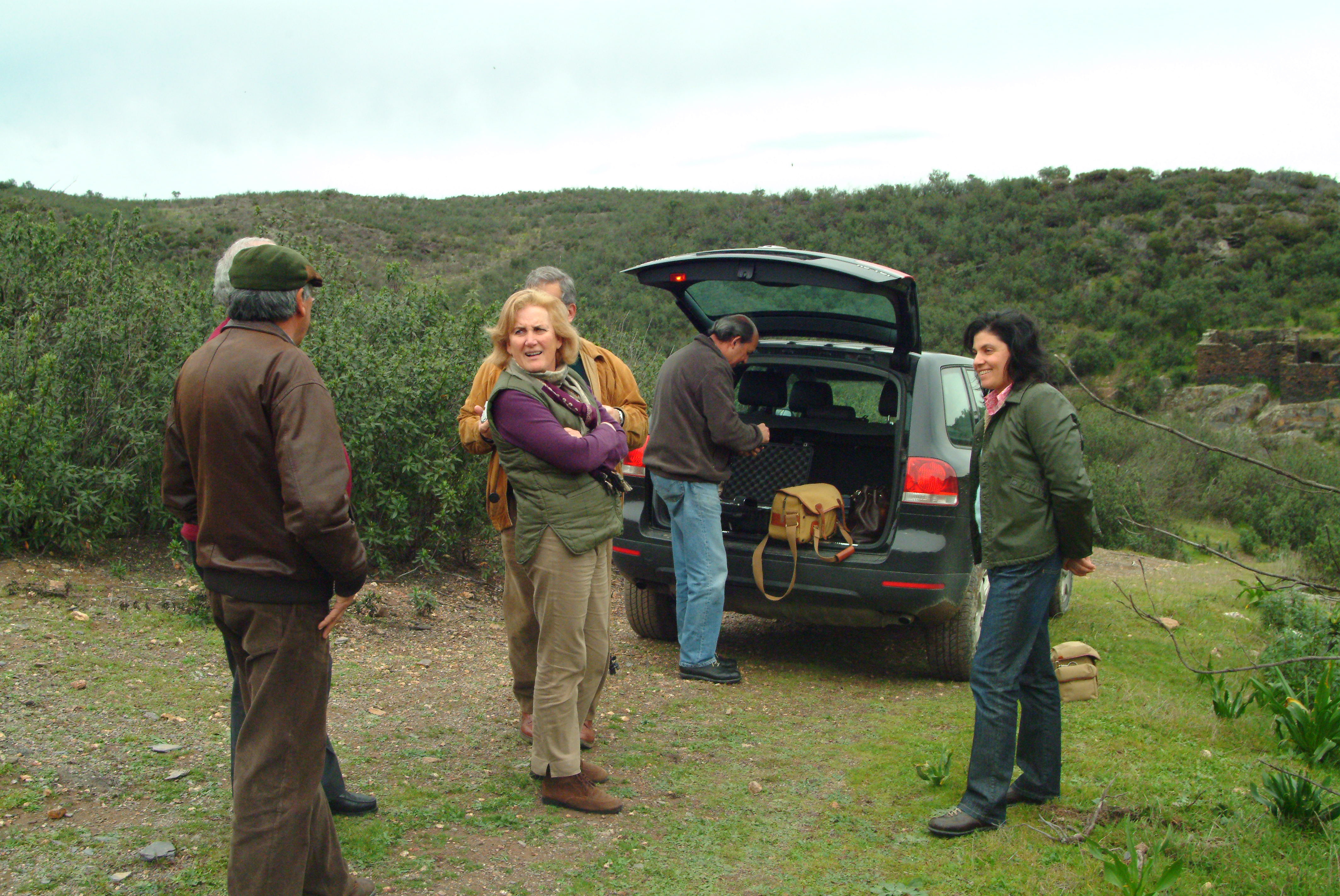 Tomina